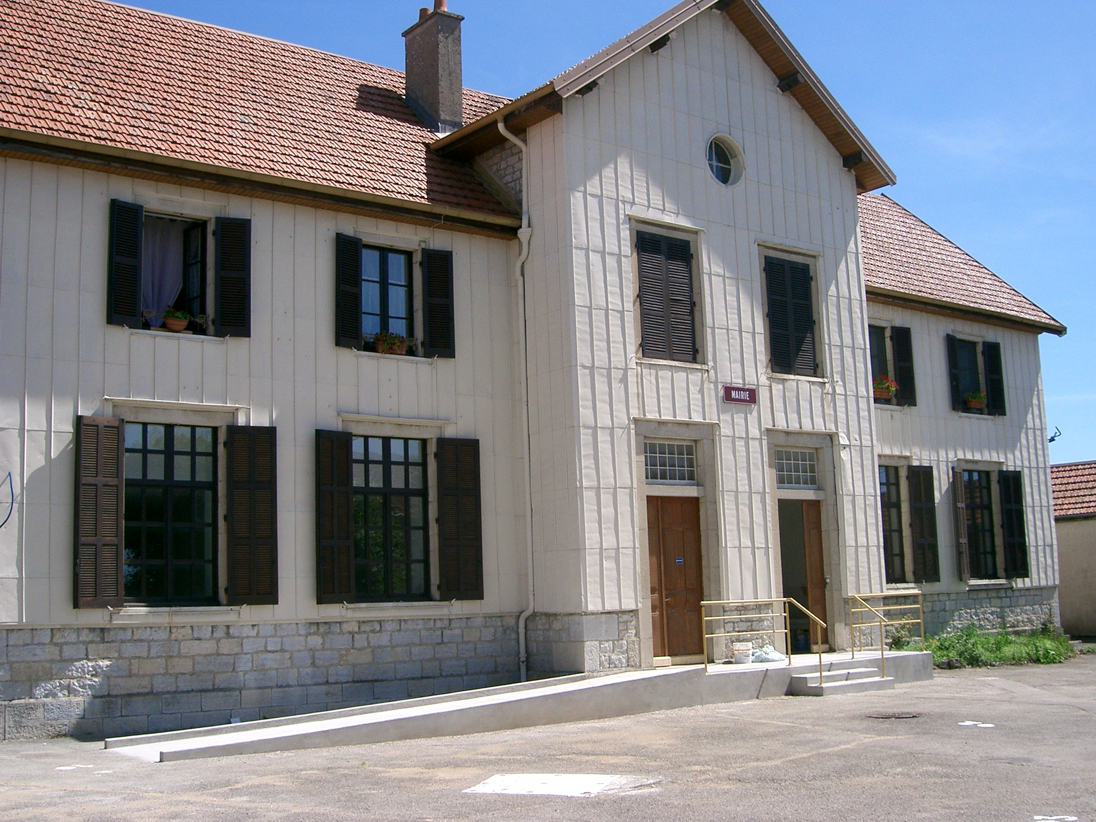 Mont-sur-Monnet : mairie-école (Jura - France)